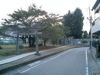 内間木神社（埼玉県朝霞市上内間木）